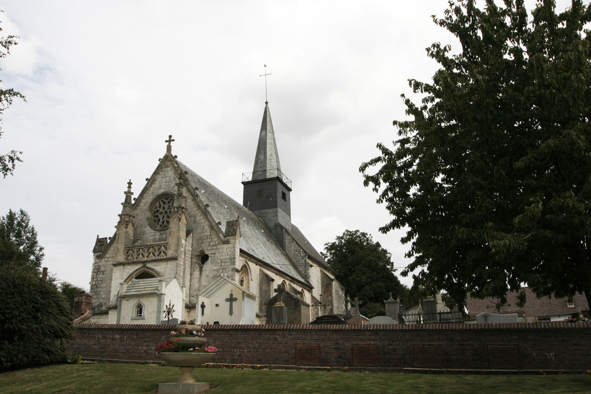 Écuires église .